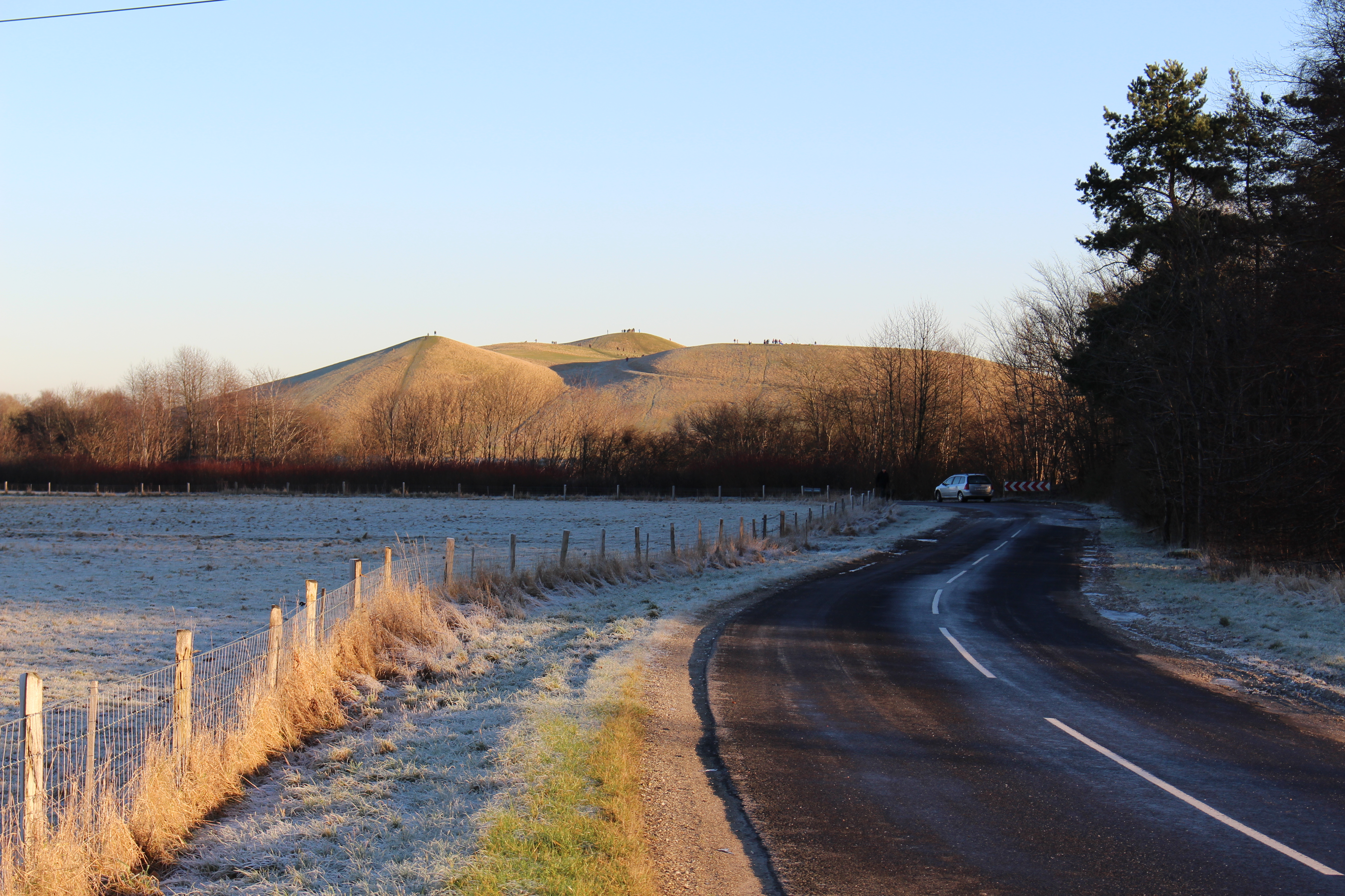 Herstedhøje fra vest